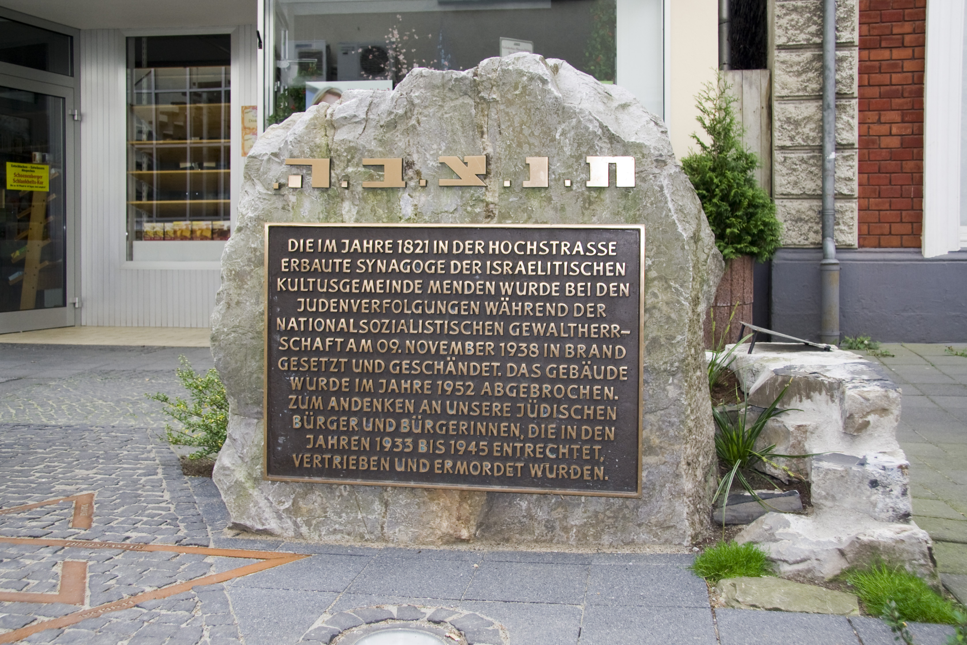 Gedenkstein des Ortes der Erinnerung in Menden